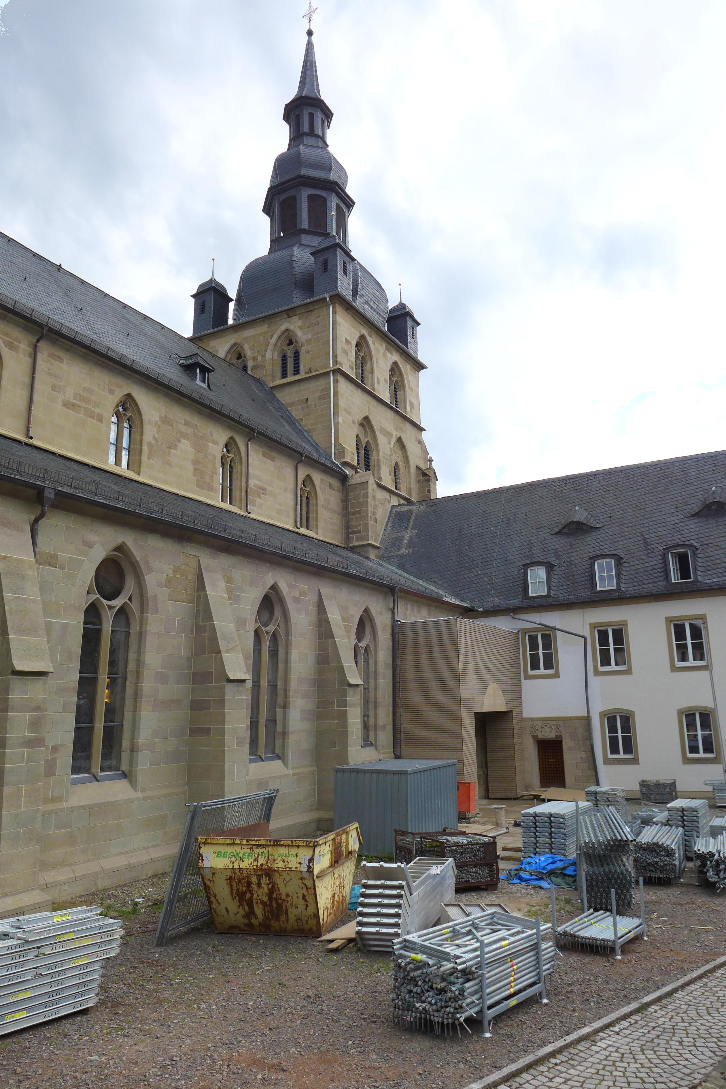 Benediktinerabtei St. Mauritius (Tholey), Zustand der Renovierungsarbeiten im Juli 2020